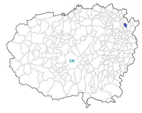 Posizione del comune nella provincia di Cuneo